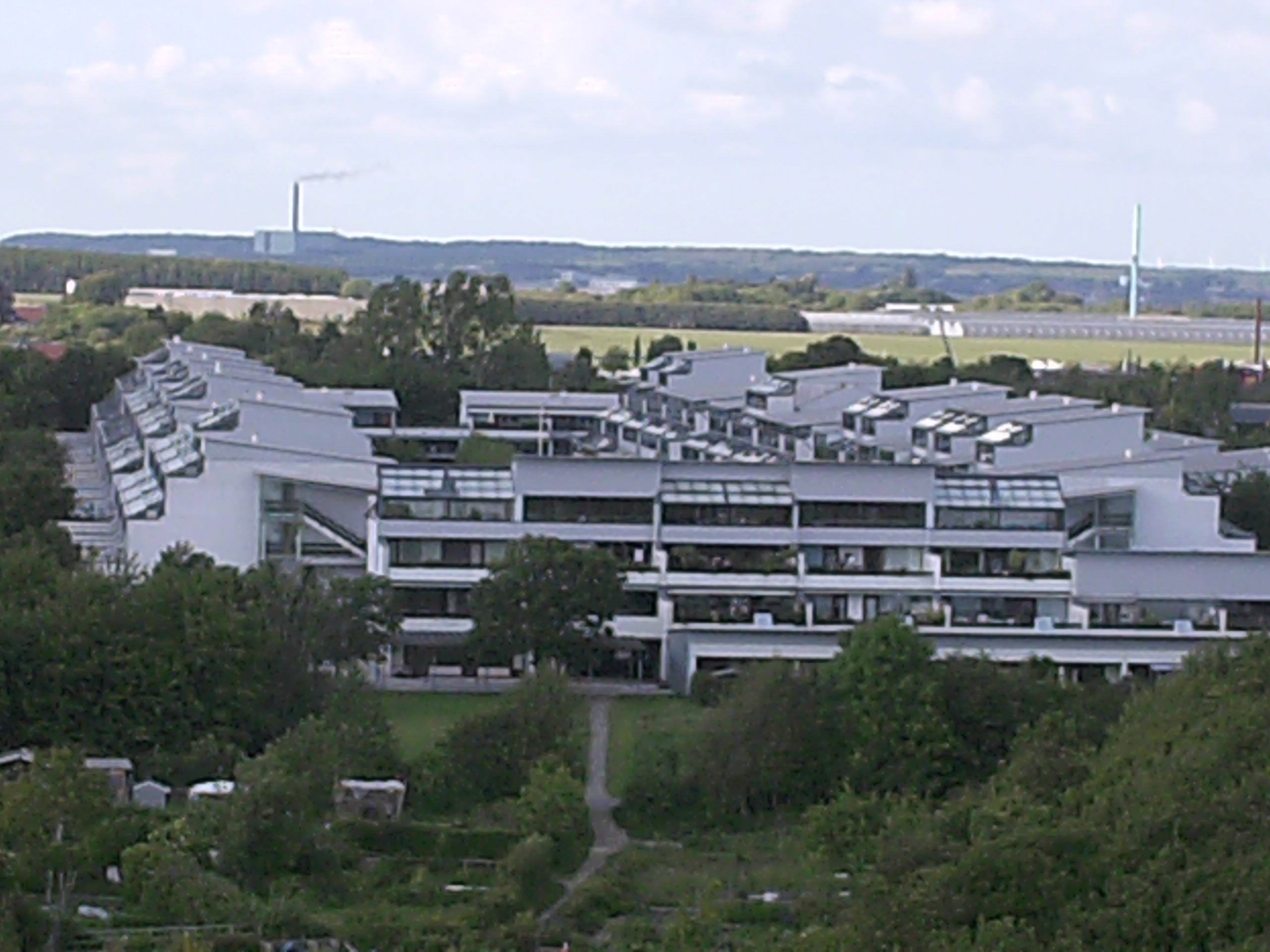 Holmstrup-bebyggelsen i Århus.